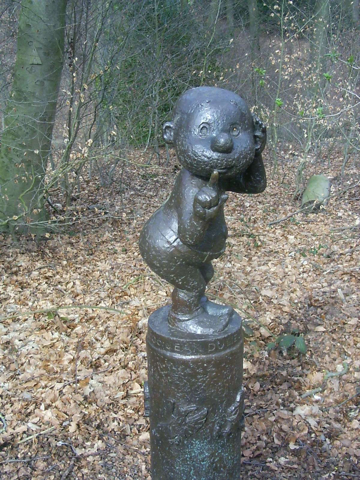 Arnhem, Gulden Bodem, beeld van Paulus de Boskabouter